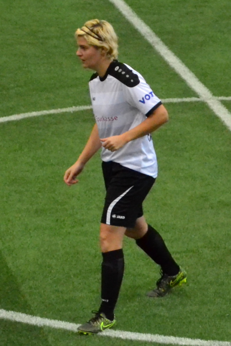 Lisa Wich (TSV Crailheim) beim SAP Frauen-FußballCup 2016